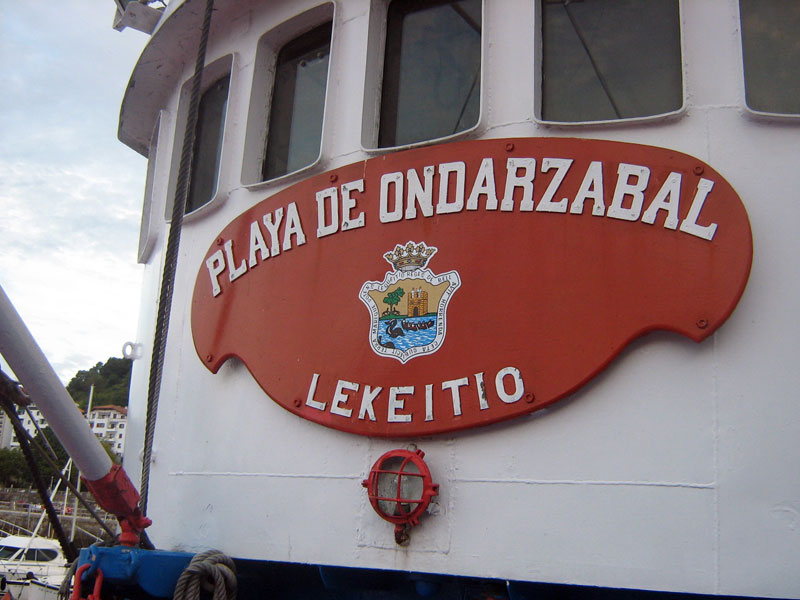 Barco Playa de Ondarzabal, en Lekeitio.